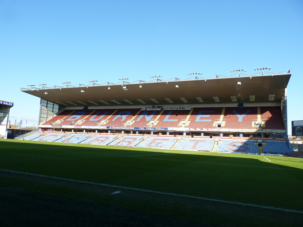 Longside